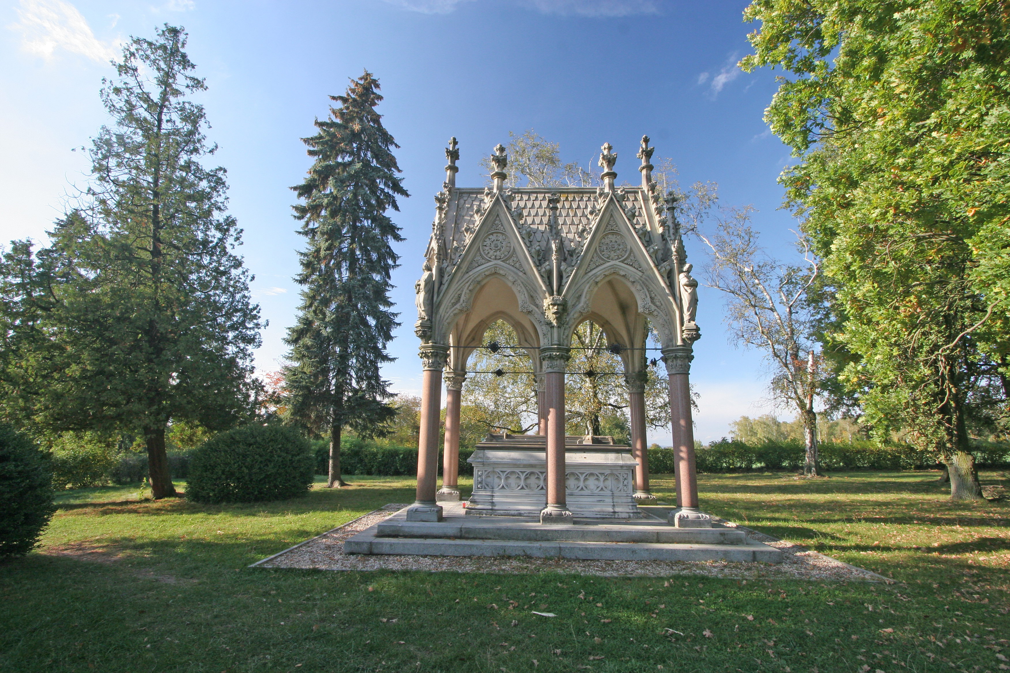 František Dvořáček nach einem Entwurf von Friedrich von Schmidt (1825-1891): Ossarium auf der Anhöhe von Chlum und Ganitsarkophag (mit den Gebeinen von 36 Gefallenen der Schlacht bei Königgrätz), Neogotik, errichtet 1899 südlich des Hügels Chlum (337 m), zwischen Chlum bei Schestar (Všestary) und Leipa (Lípa) in der Königgrätzer Region (Královéhradecký kraj), Böhmen, Tschechien.